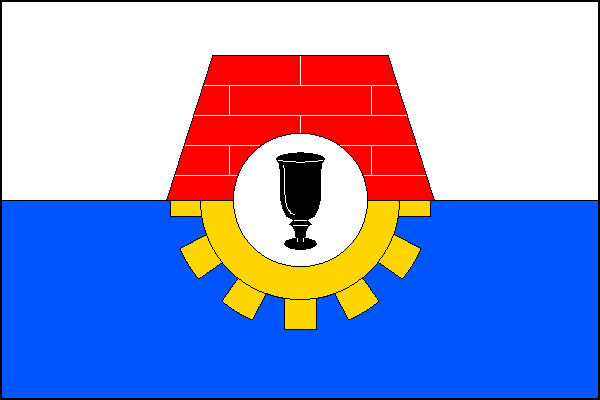 vlajka,Sklené nad Oslavou , okres Žďár nad Sázavou